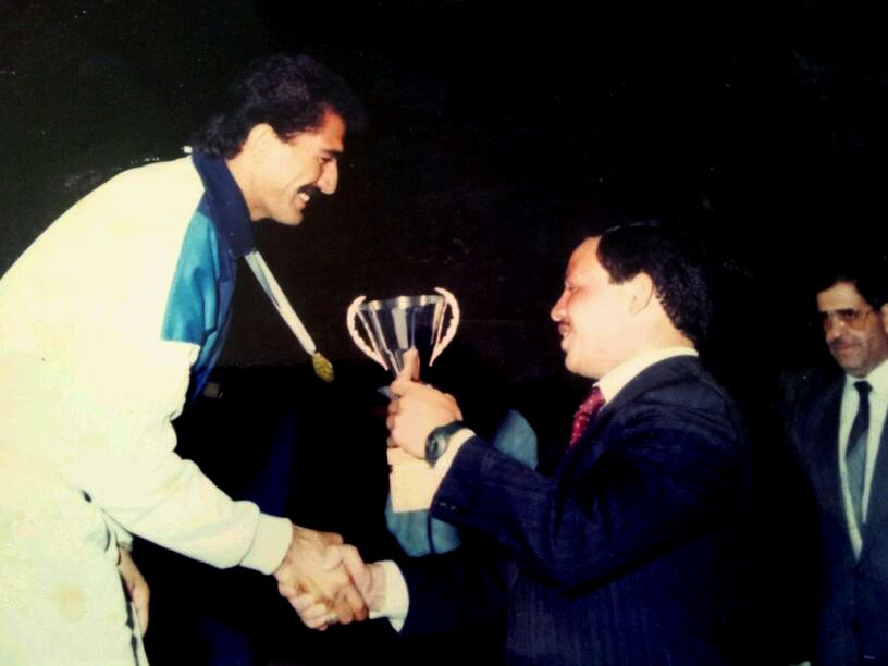 سعد عبد الرحيم يستلم جائزه هداف مجلس التعاون العربي من جلاله الملك عبد الله بن الحسين ملك الاردن